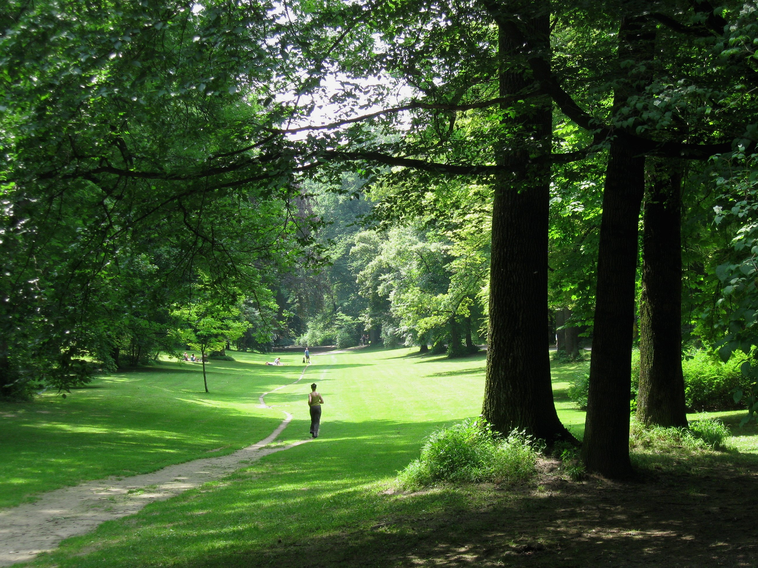 Maximiliansanlagen, München